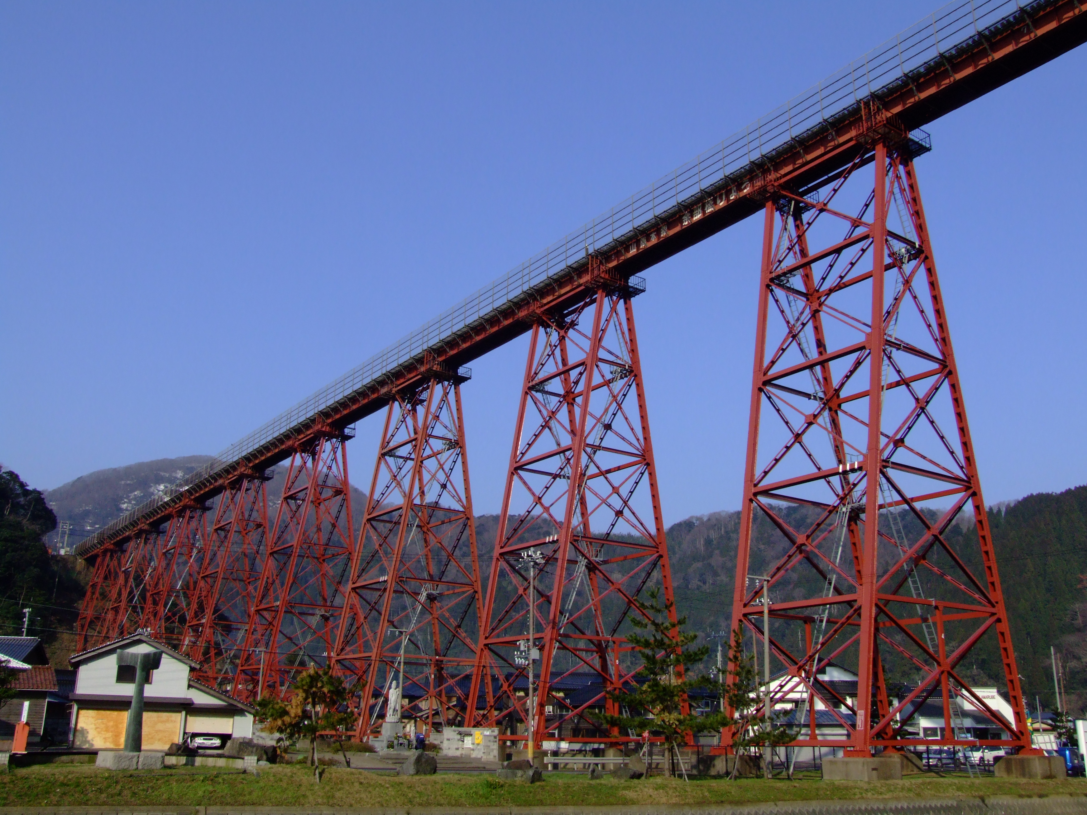 青と赤のコントラストを輝かす餘部橋梁